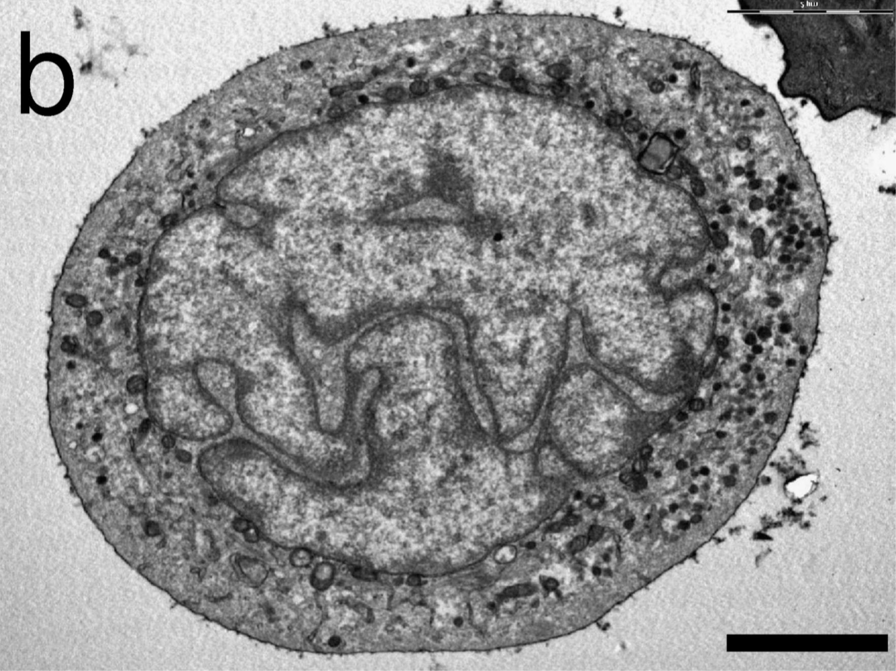 Figura 3. El análisis por microscopía electrónica confirmó la identidad de las células de Merkel. Los análisis ultraestructurales se llevaron a cabo en células de la fracción CM enriquecida. b) Hasta la mitad de las células presentaban características características de los MC: un núcleo polilobulado con numerosos gránulos típicos de núcleo denso en un citoplasma claro. Barra de escala= 2 μm